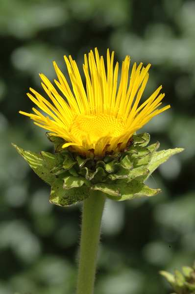 Fleur (capitule) de l'Inule helenium Ã Ploufragan (22) le 16/07/2004 source 1 source 2 sachant que le webmestre Mikrolit' propose toutes ses photos sous licence Art-Libre.